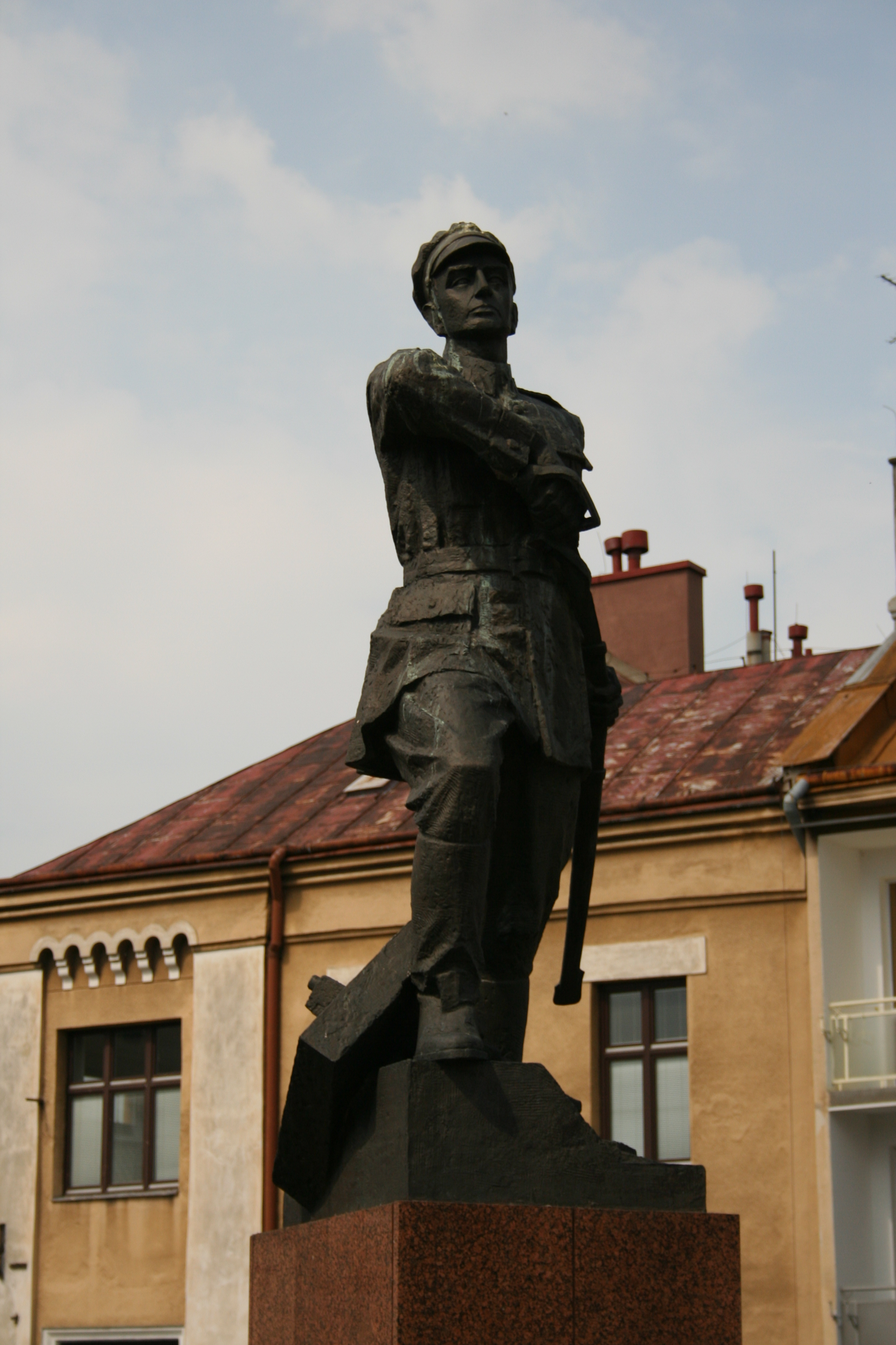 Pomnik Lisa Kuli w Rzeszowie - bryła pomnika